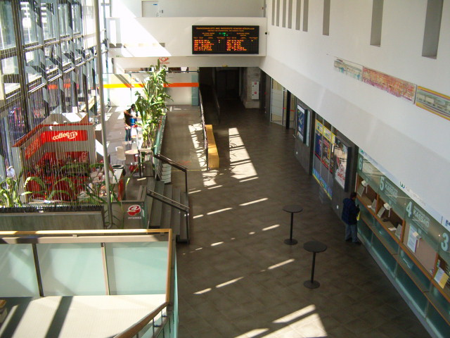 Jaamahoone sisevaade aastal 2009